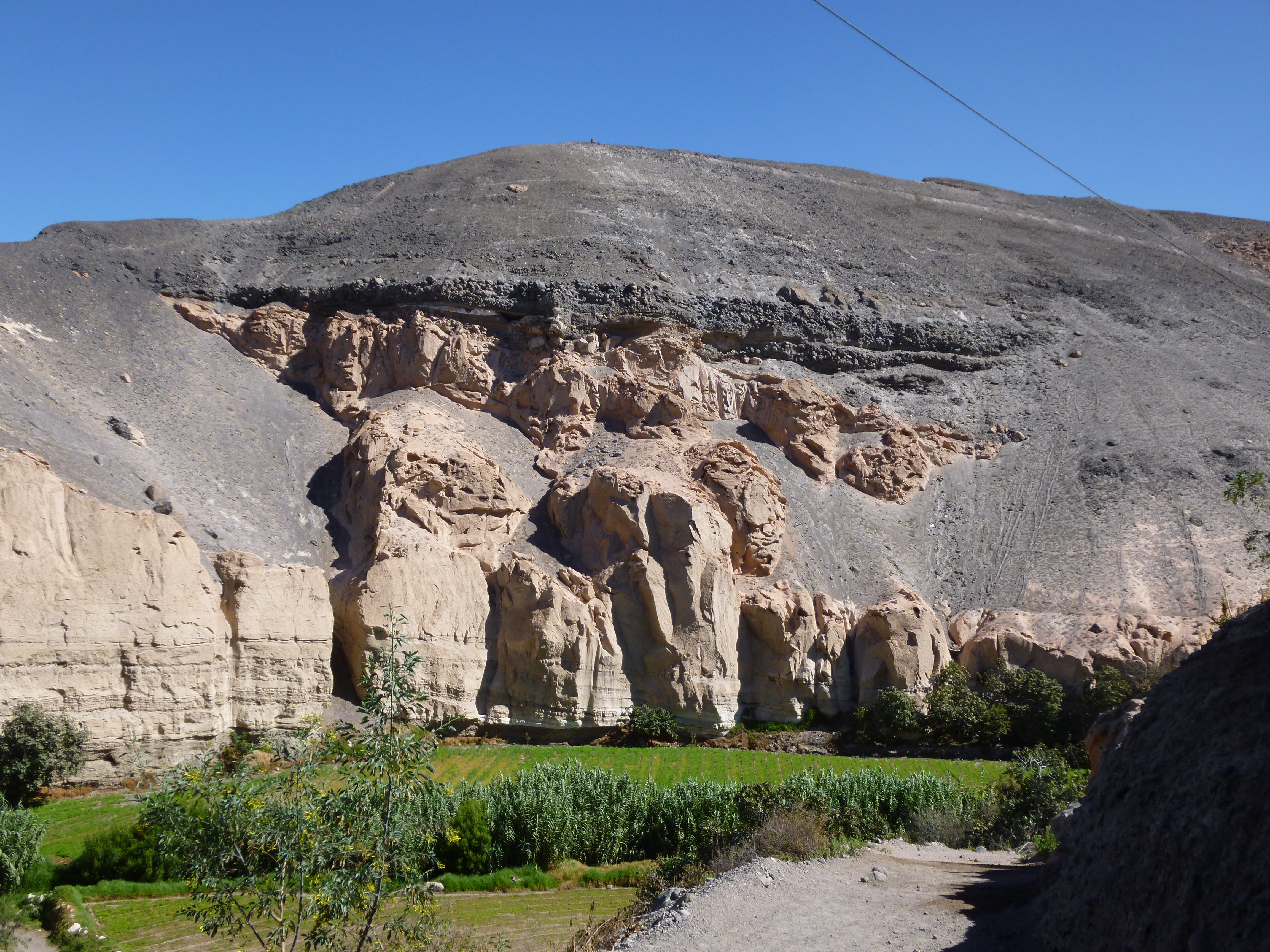 Formaciones Geologicas en la Quebrada de Añashuayco, Distrito de Uchumayo, Arequipa